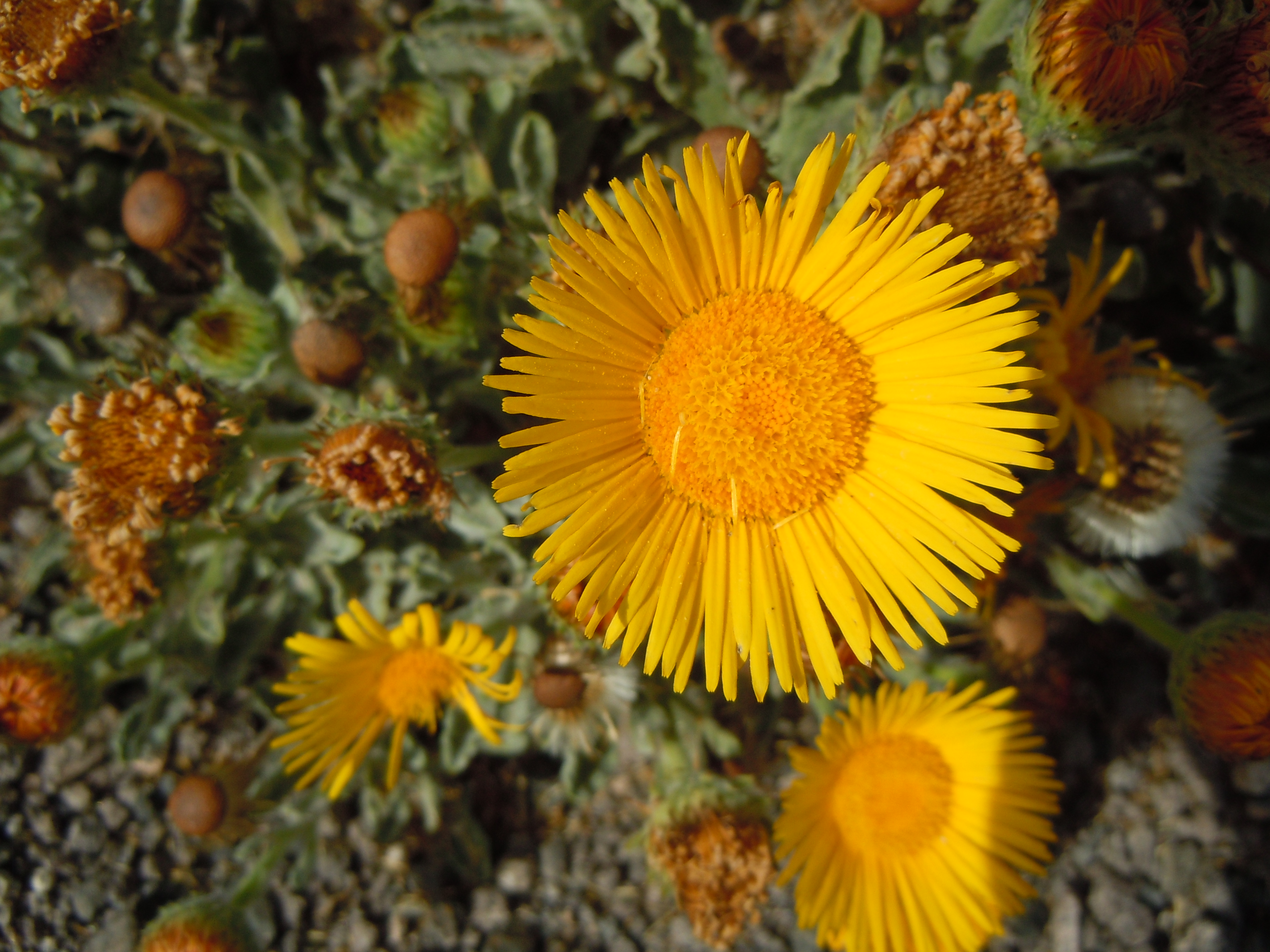 Pulicaria canariensis, Playa de Papagayo, Yaiza, Lanzarote